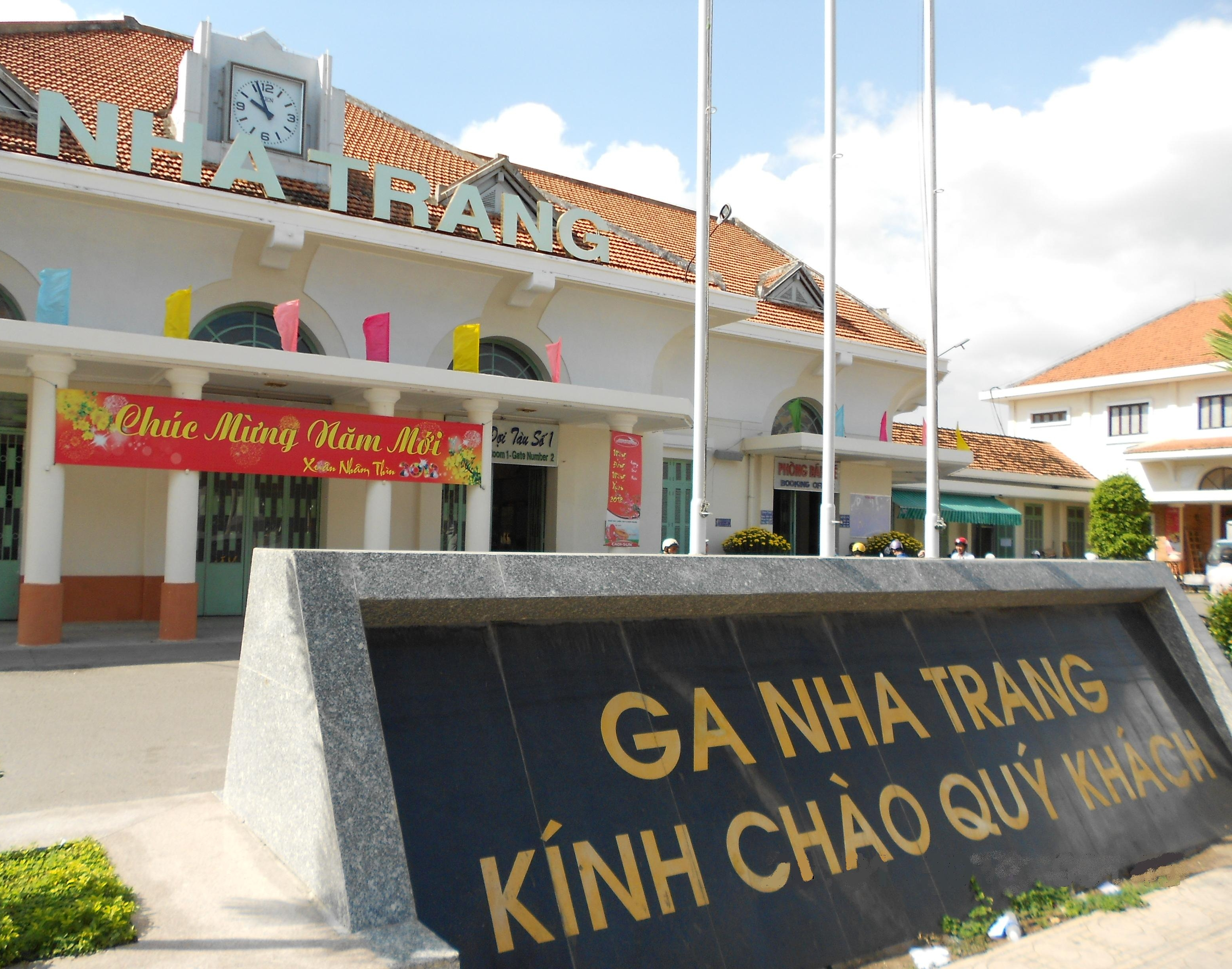 Bahnhofsgebäude mit Deko zum Chin. Neujahr in Nha Trang, Vietnam